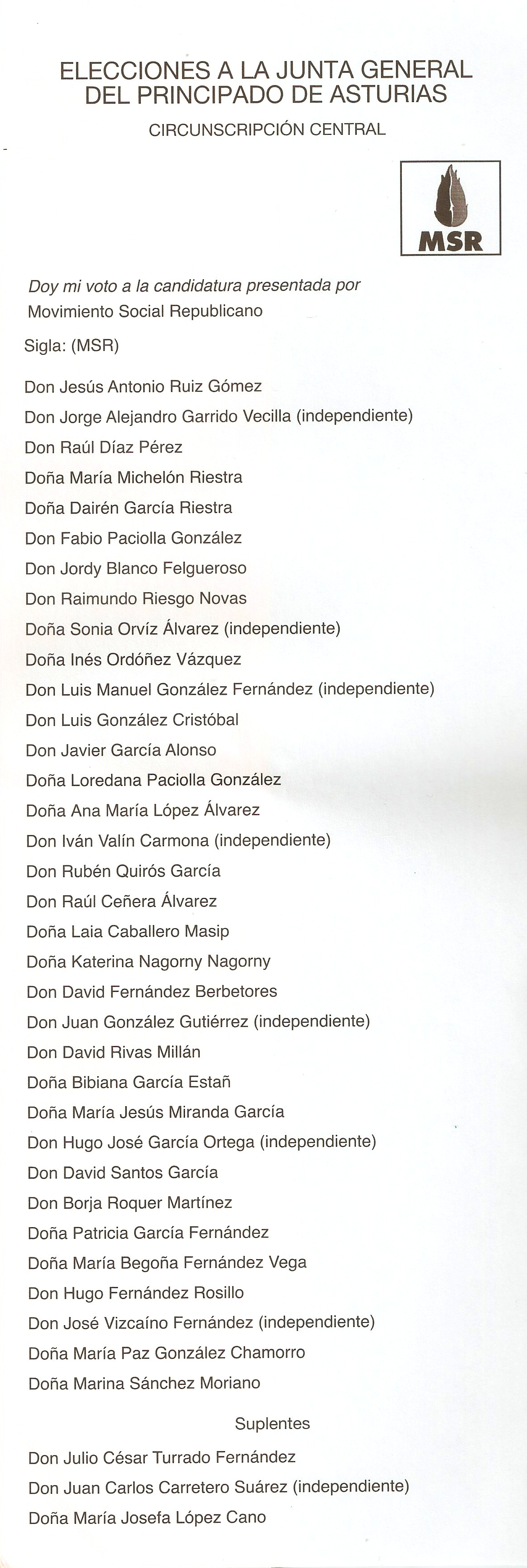 Papeleta del Movimiento Social Republicano para las elecciones autonómicas de Asturias de 2012. Distrito Central.